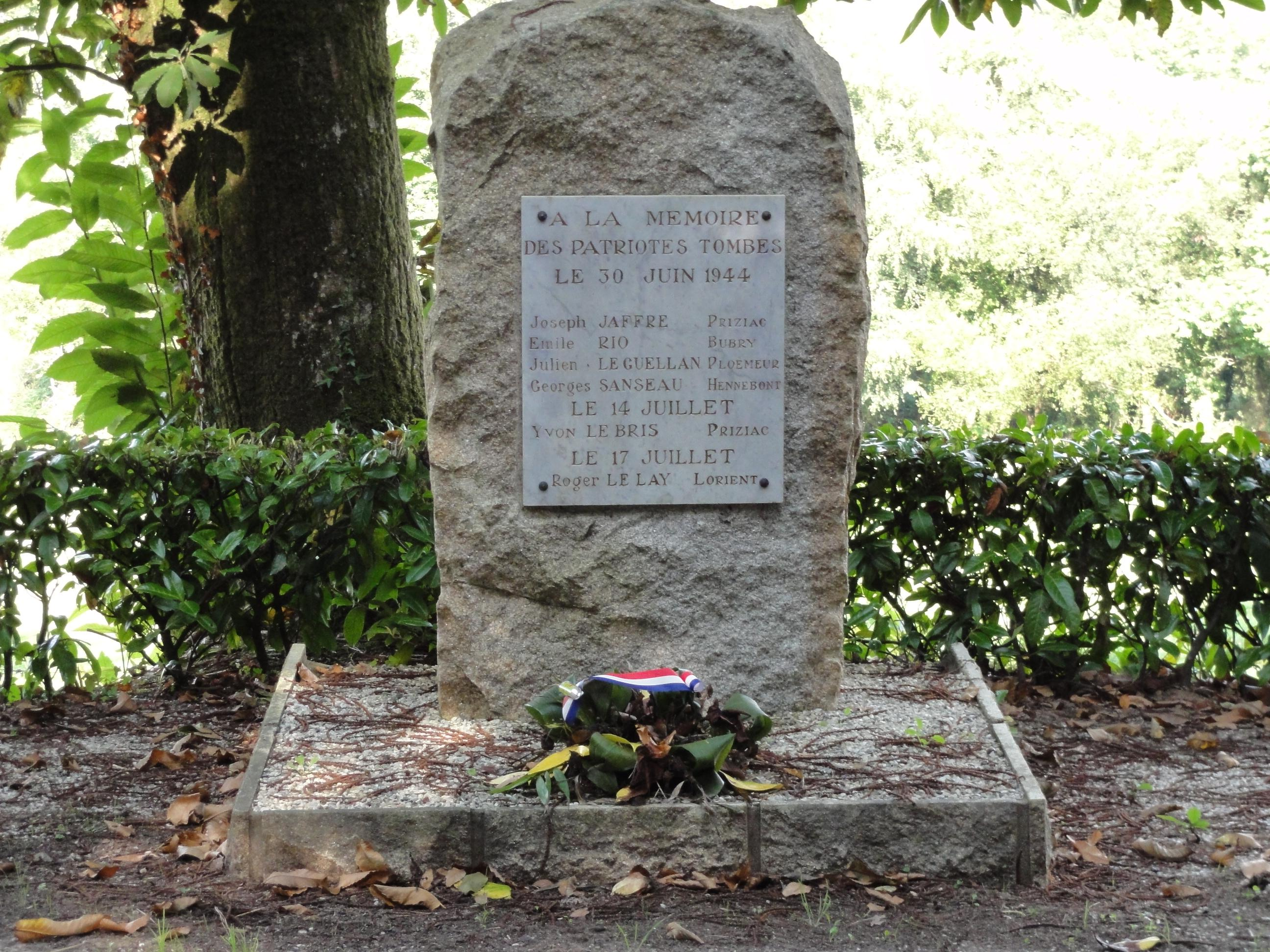 stèle commémorative des résistants fusillés en 1944 à Botquenven, commune de Priziac, département du Morbihan, France